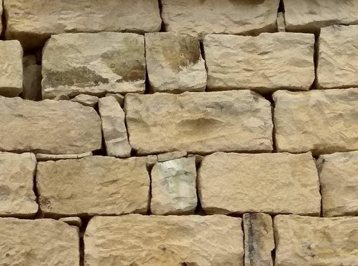 Η πέτρα που εξορύσσεται από το τοπικό λατομείο Μεταξάδων